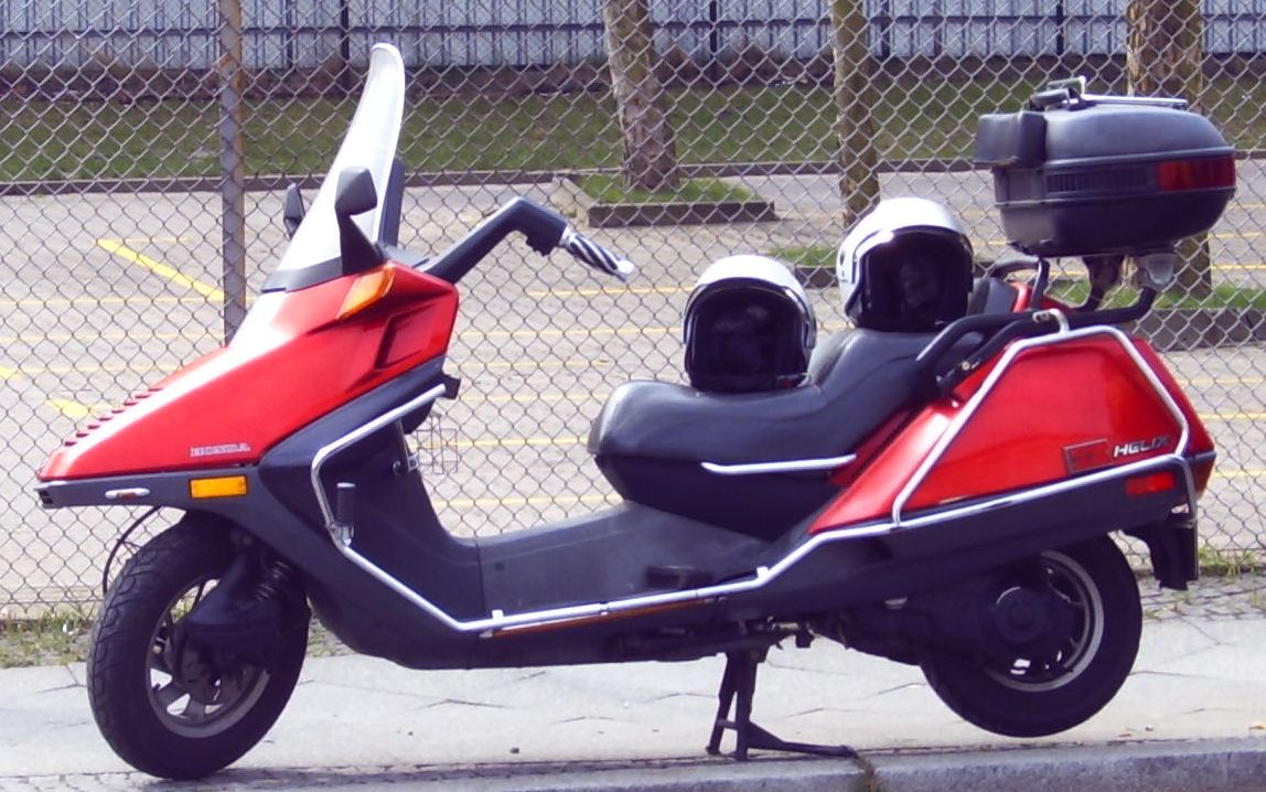 Honda Helix CN 250 Bj. 1993